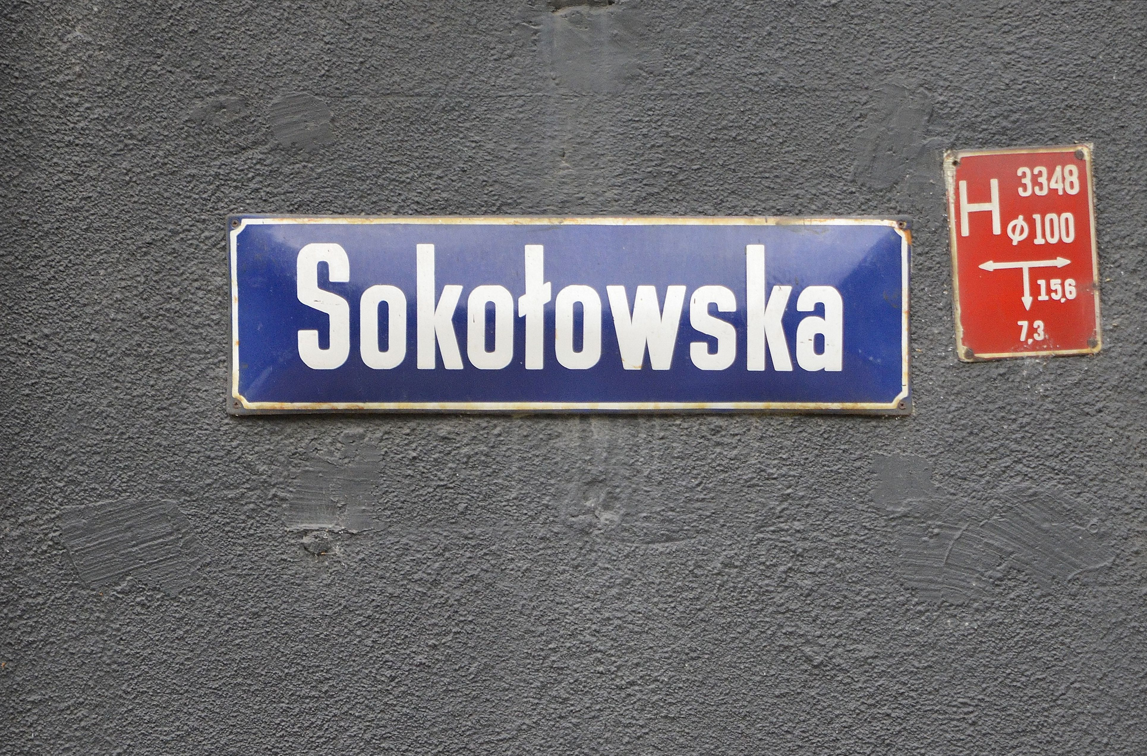 Tablica na jednym z budynków przy ul. Sokołowskiej w Warszawie